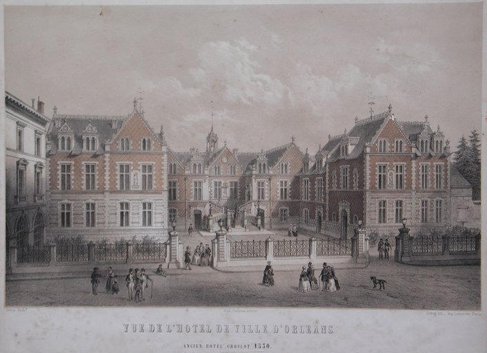 Vue de l'Hôtel de Ville d'Orléans, Hôtel Groslot, France